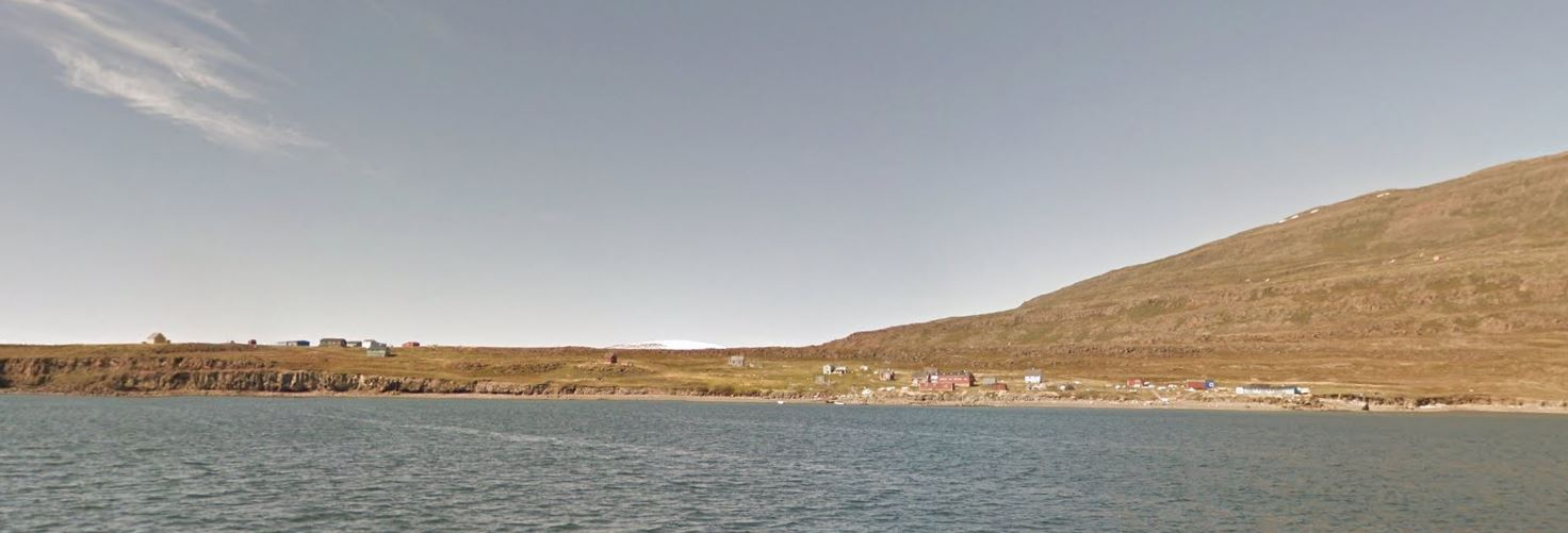 Kangerluk